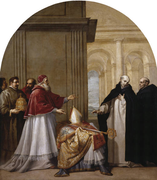 San Bruno renuncia ante el papa Urbano II al arzobispado de Reggio Calabria.label QS:Les,"San Bruno renuncia ante el papa Urbano II al arzobispado de Reggio Calabria."